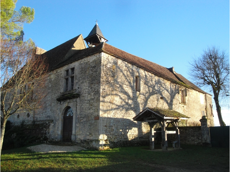 chapelle